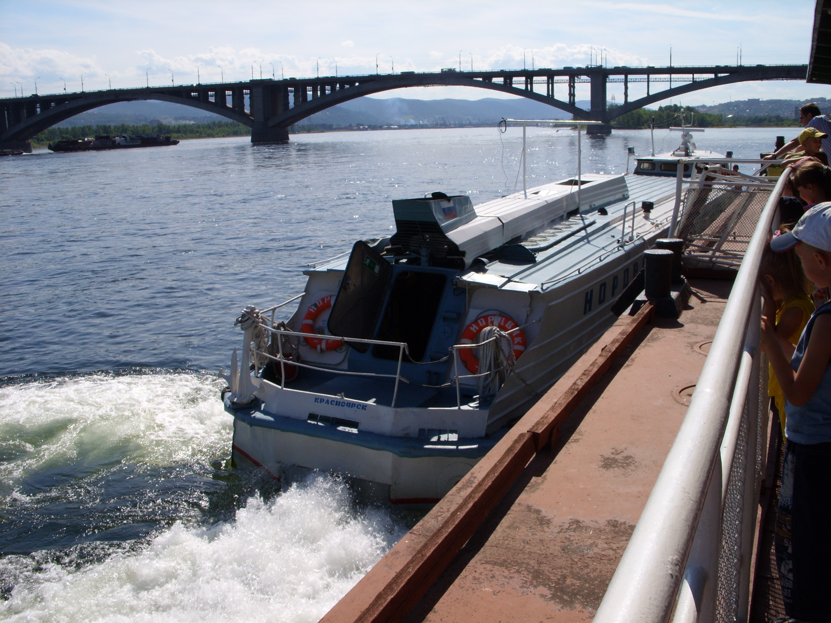 собирается отплыть в Дивногорск